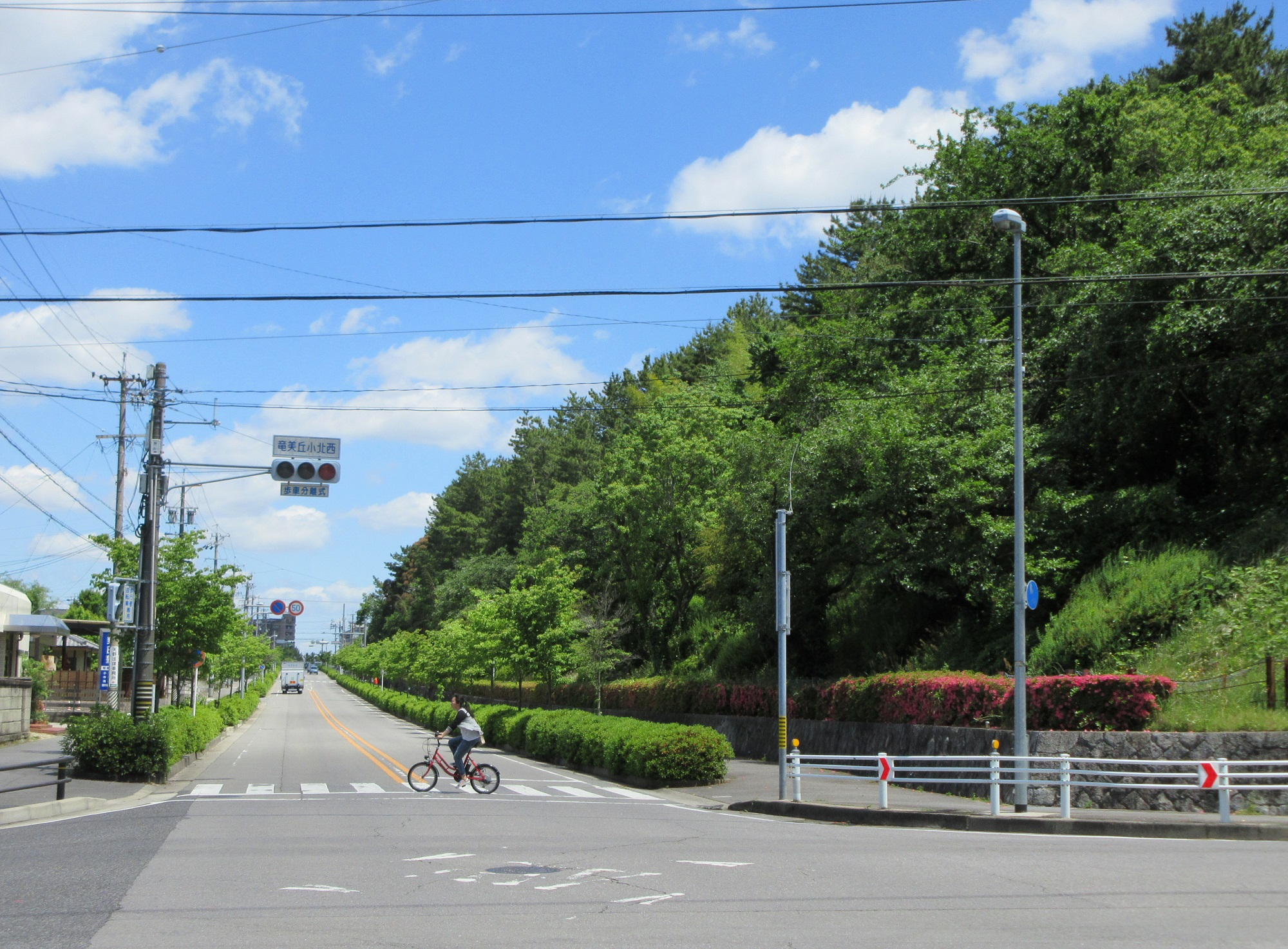 竜美丘ポプラ通り